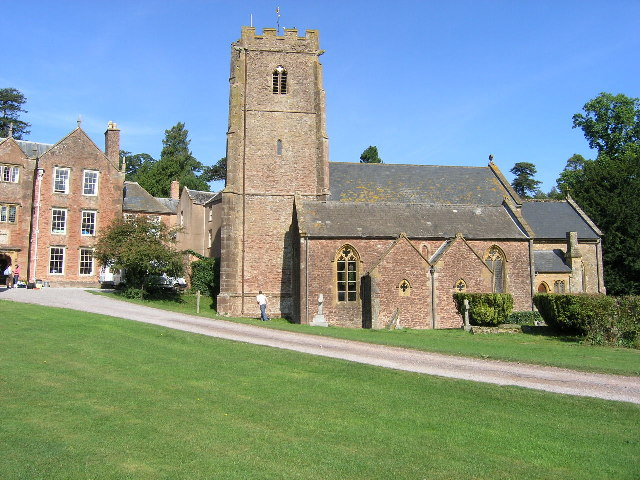 NETTLECOMBE, Somerset